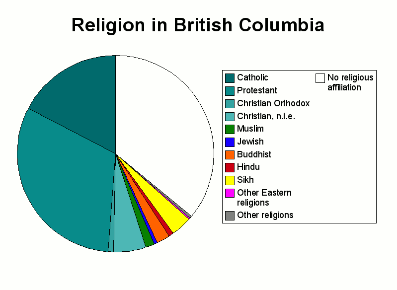 Religion in BC